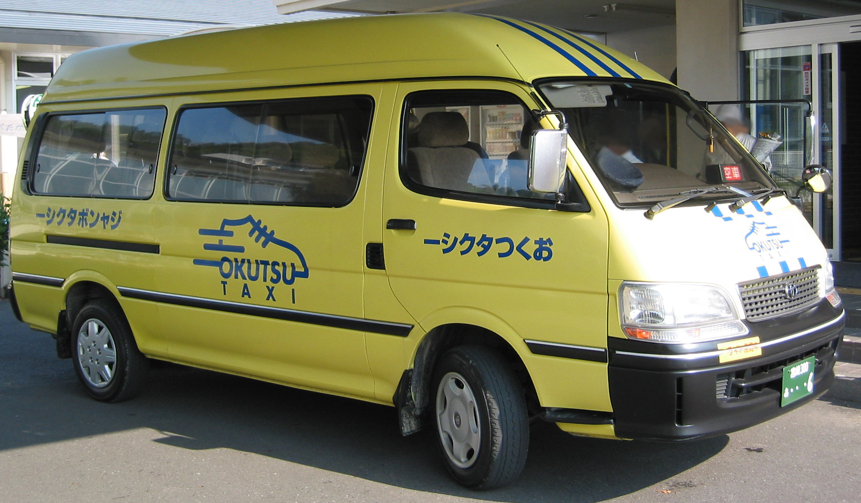 おくつタクシー（宮崎県） 高崎町乗合タクシーの車両